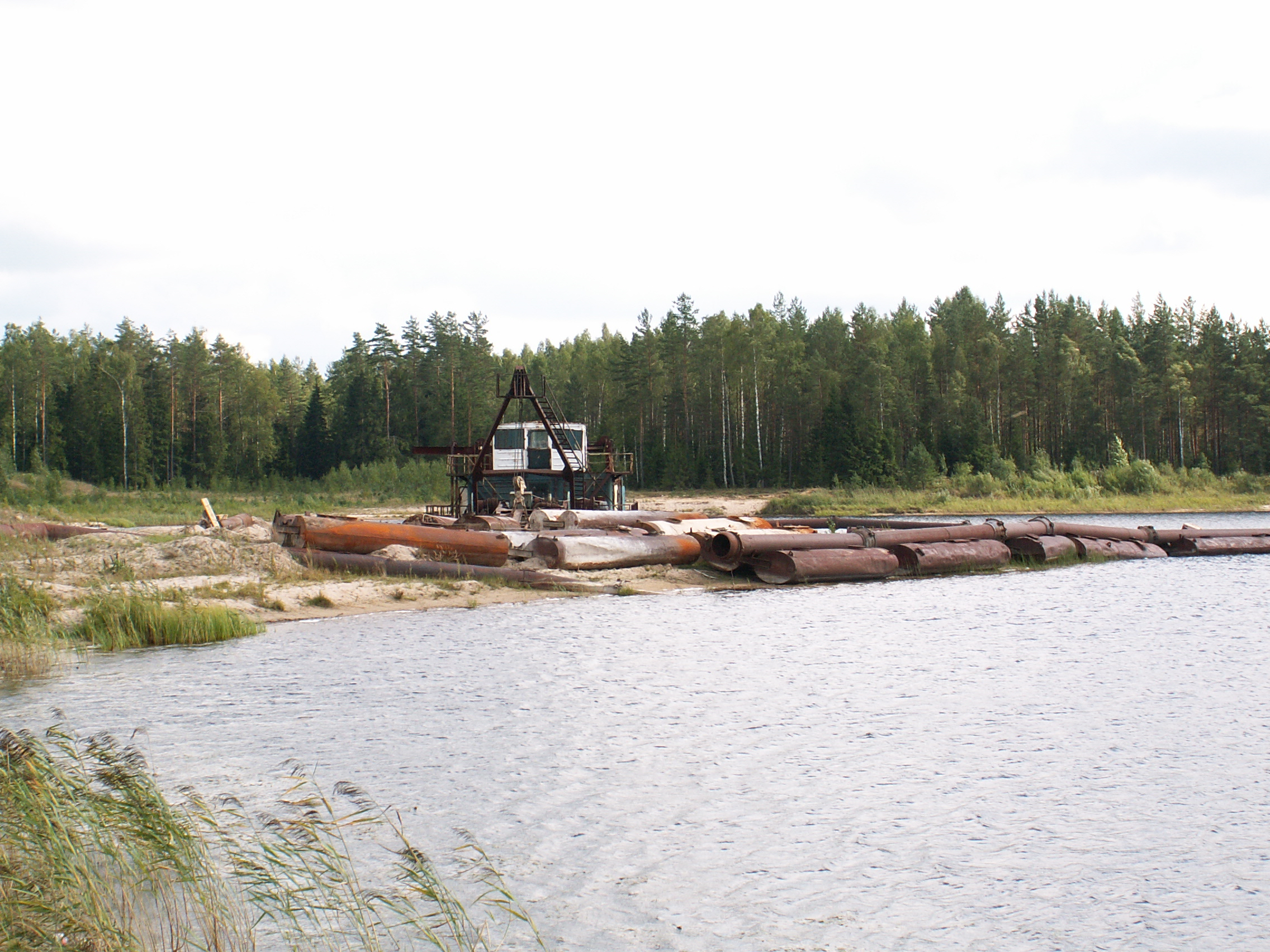 Juodbalos karjeras yra karjeras šiauriniame Anykščių krašte, vienas iš didžiausių smėlio karjerų Lietuvoje